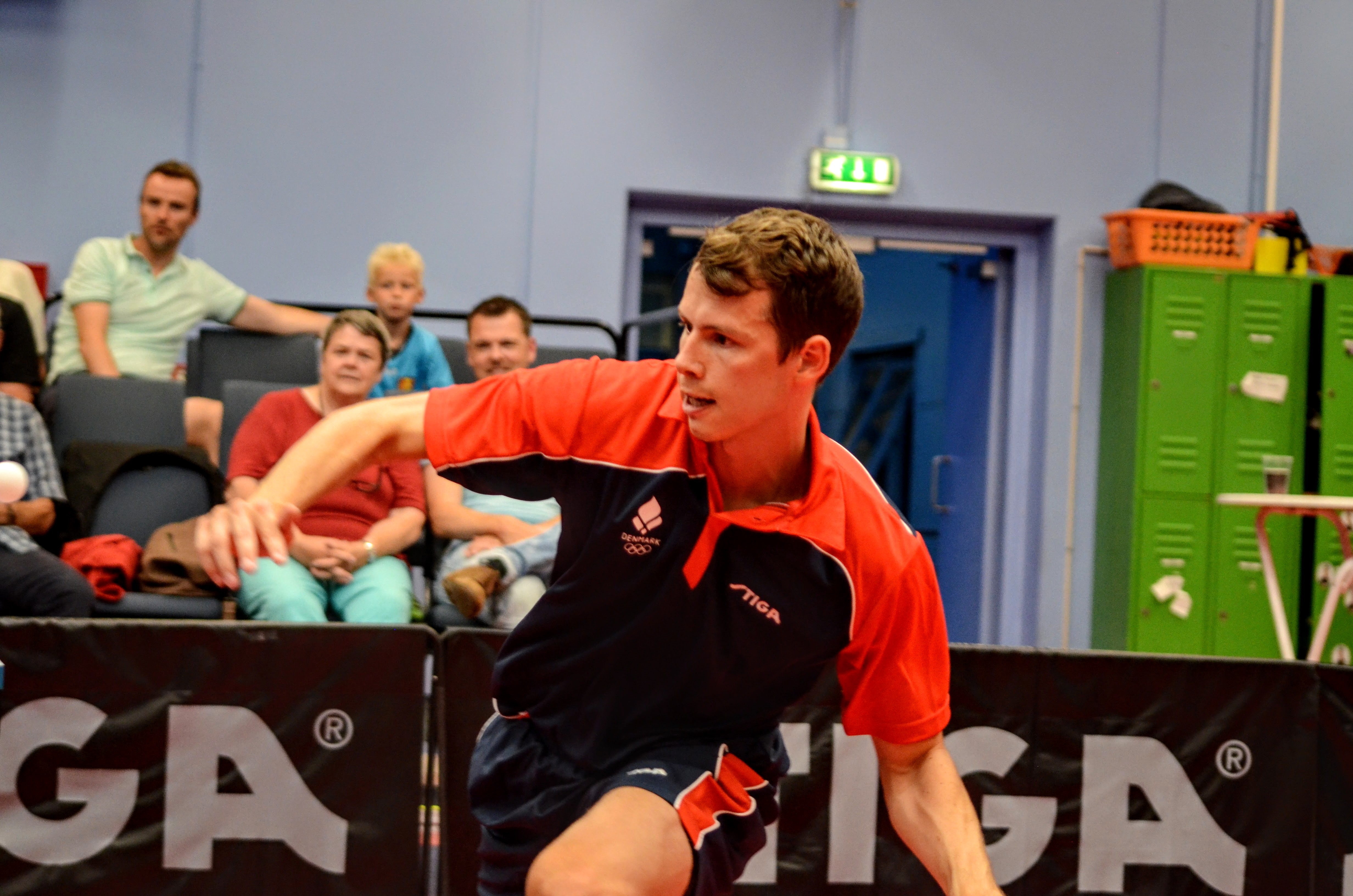 Jonathan Groth vandt forberedelsesturneringen "Ready for Rio" ved blandt andet at slå Alexander Shibaev kort før OL 2016.